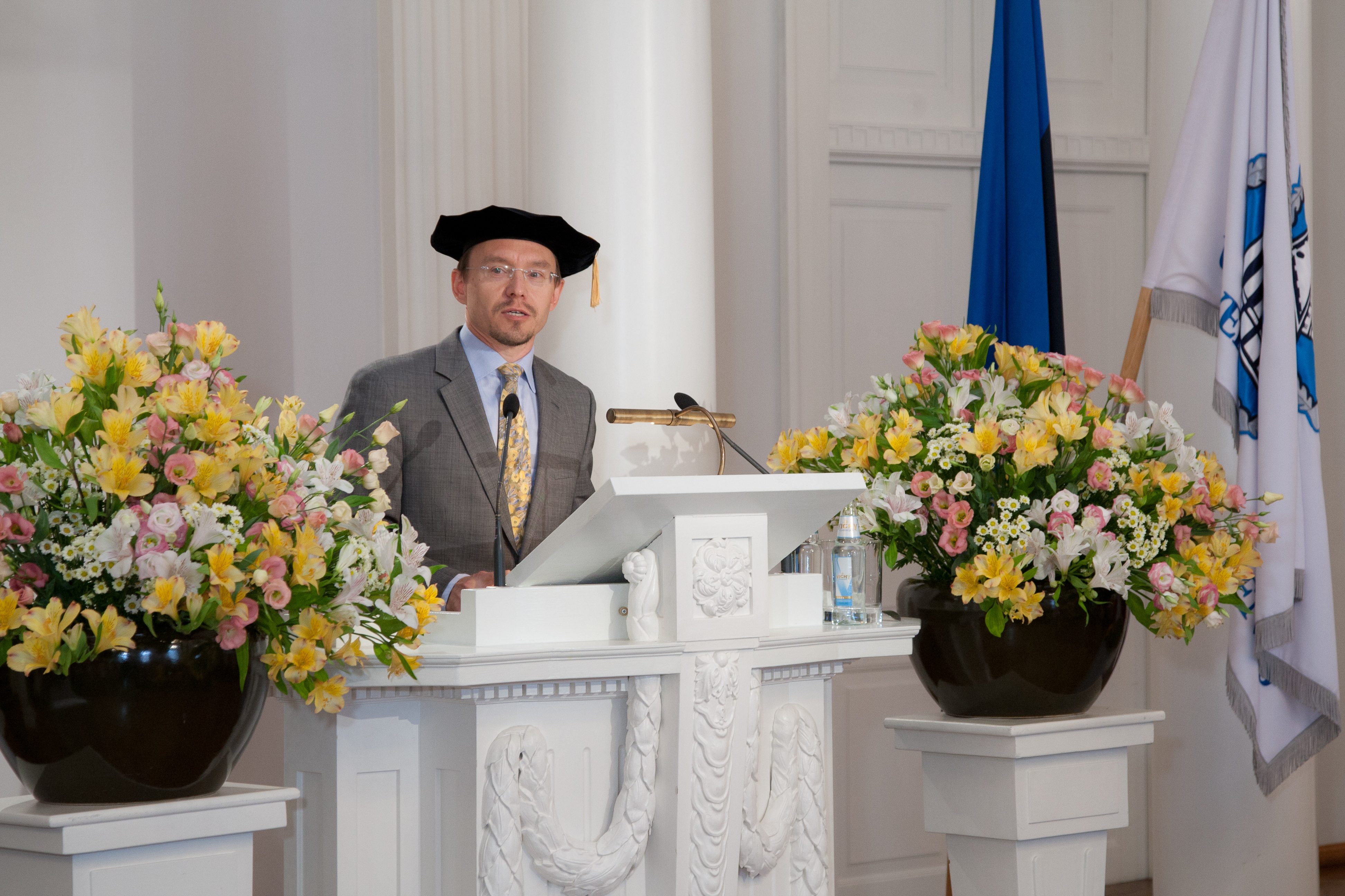 Professor Vello Pettai kõnelemas Tartu Ülikooli sotsiaal- ja haridusteaduskonna ning Euroopa Kolledži magistriõppe lõpuaktusel TÜ aulas 21. juunil 2011.